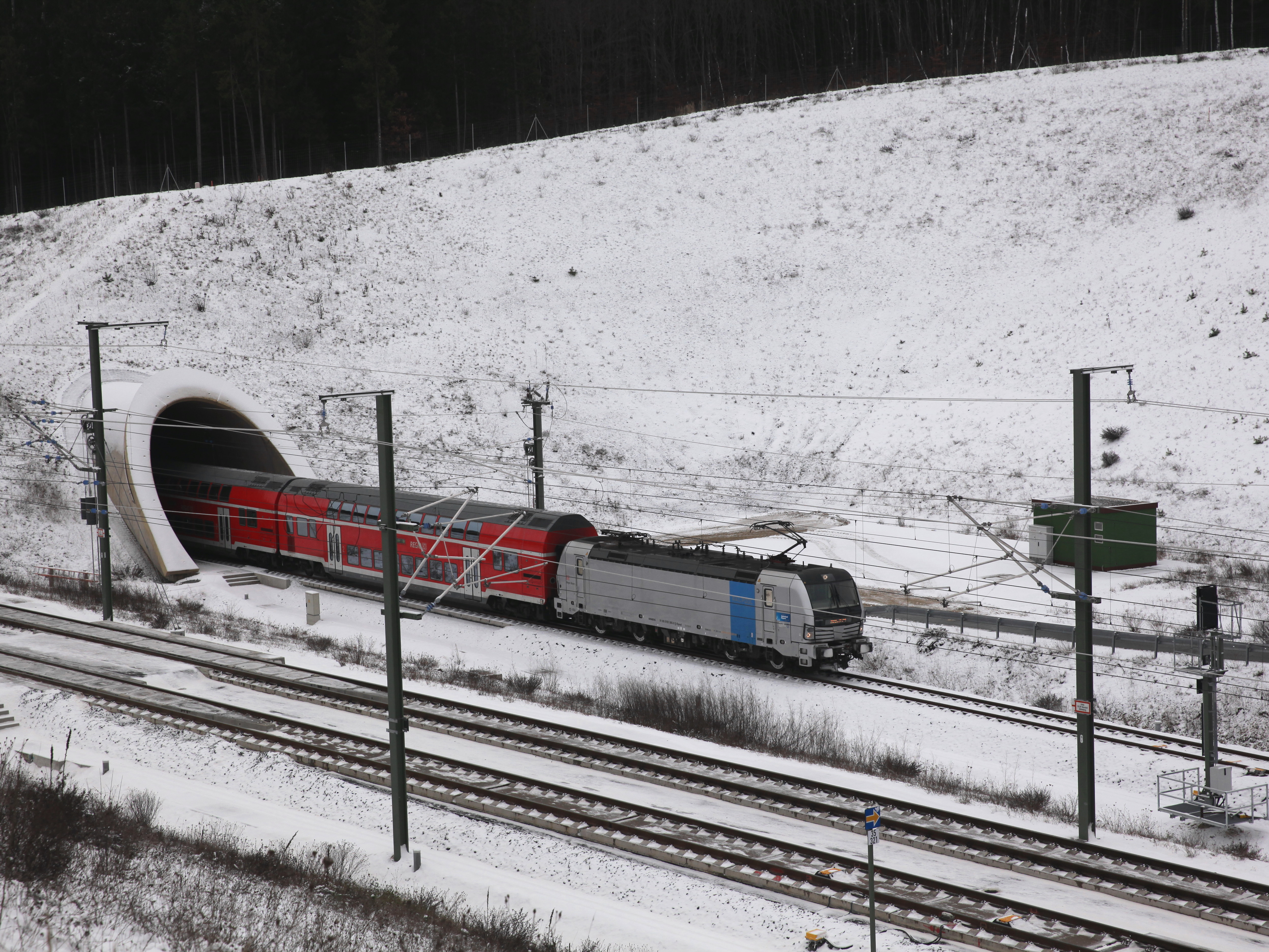 Verbindungskurve Niederfüllbach, Südseite mit Regionalexpress Sonneberg—Nürnberg